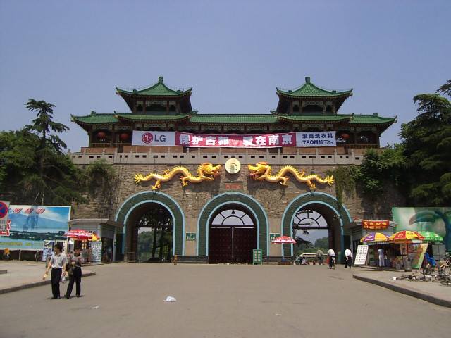 玄武湖公園 玄武門 2004年6月3日撮影 撮影者:権作 参照：